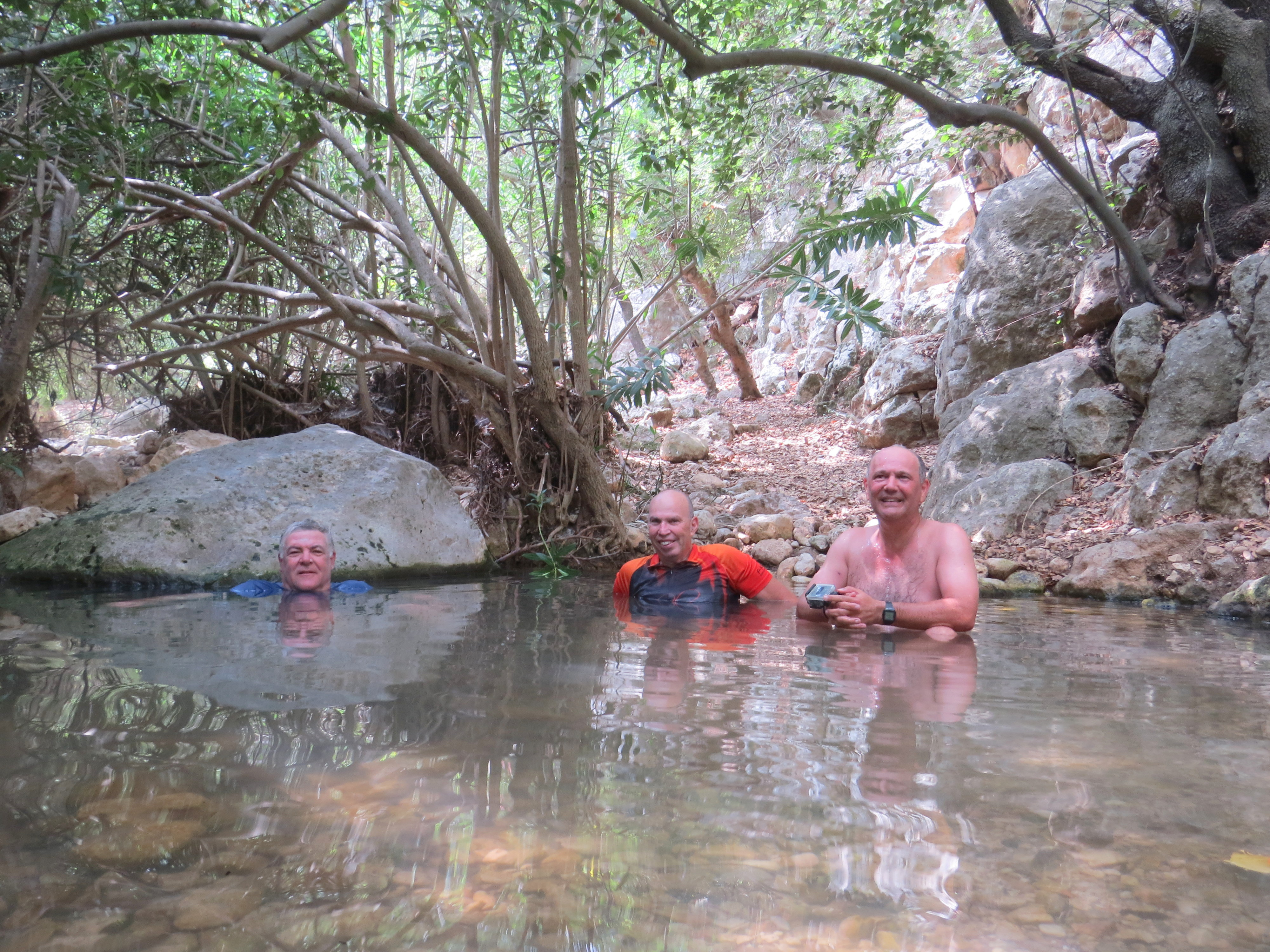 בריכה באחת הנביעות של עין אלון